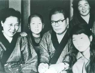 1954年撮影。左から小沢みき、小沢一郎、小沢佐重喜、小沢スミ子